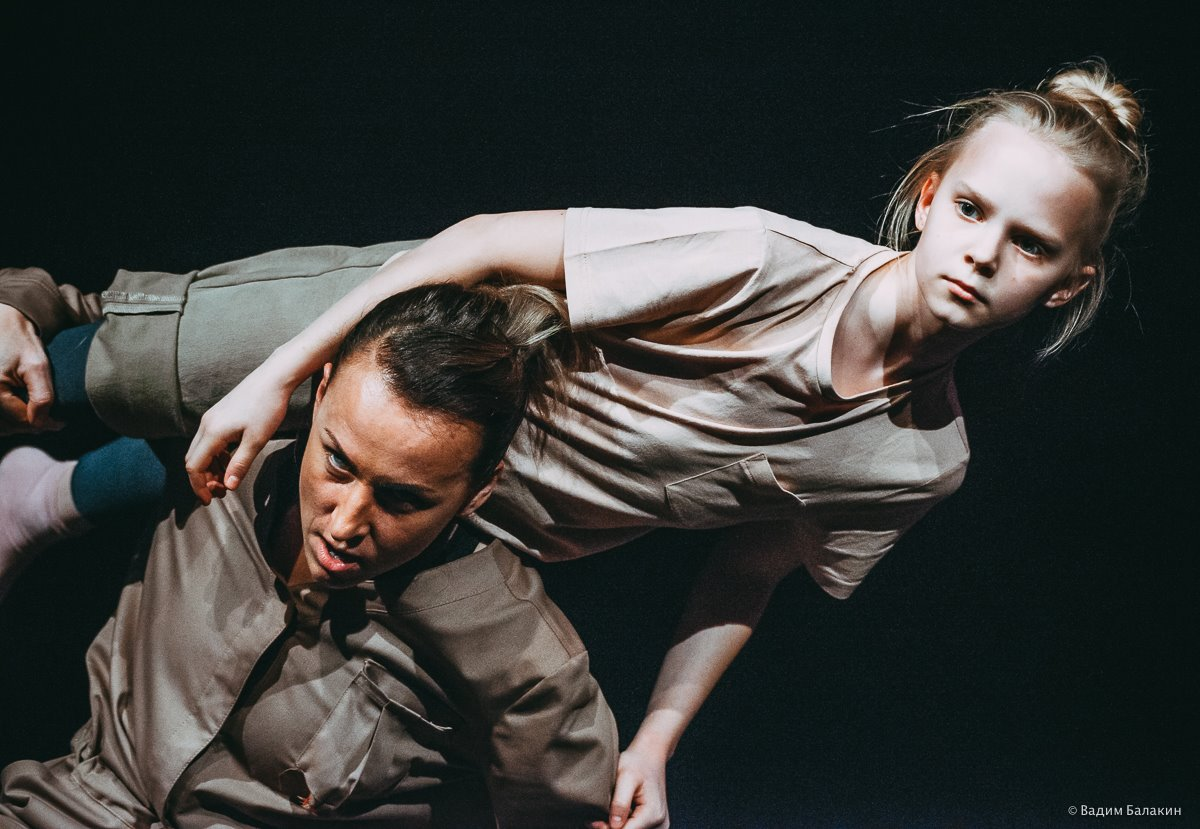 В кадре - сцена из Спектакля "N2" (исп. А.Захезина, Д.Овчинникова). Фотограф - Вадим Балакин